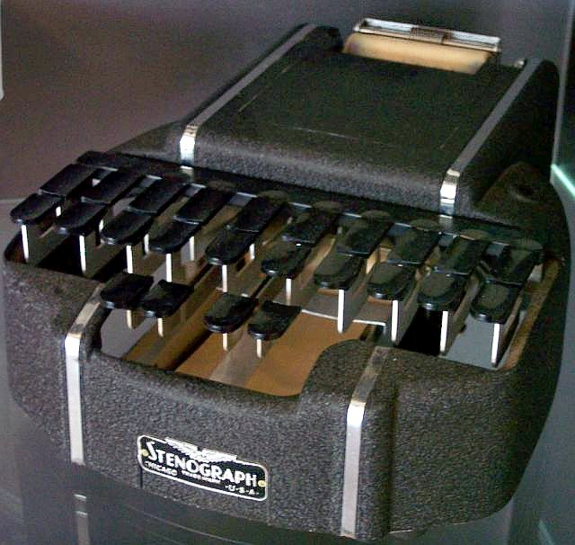 Maschinenstenograph, Nixdorfmuseum, 2004